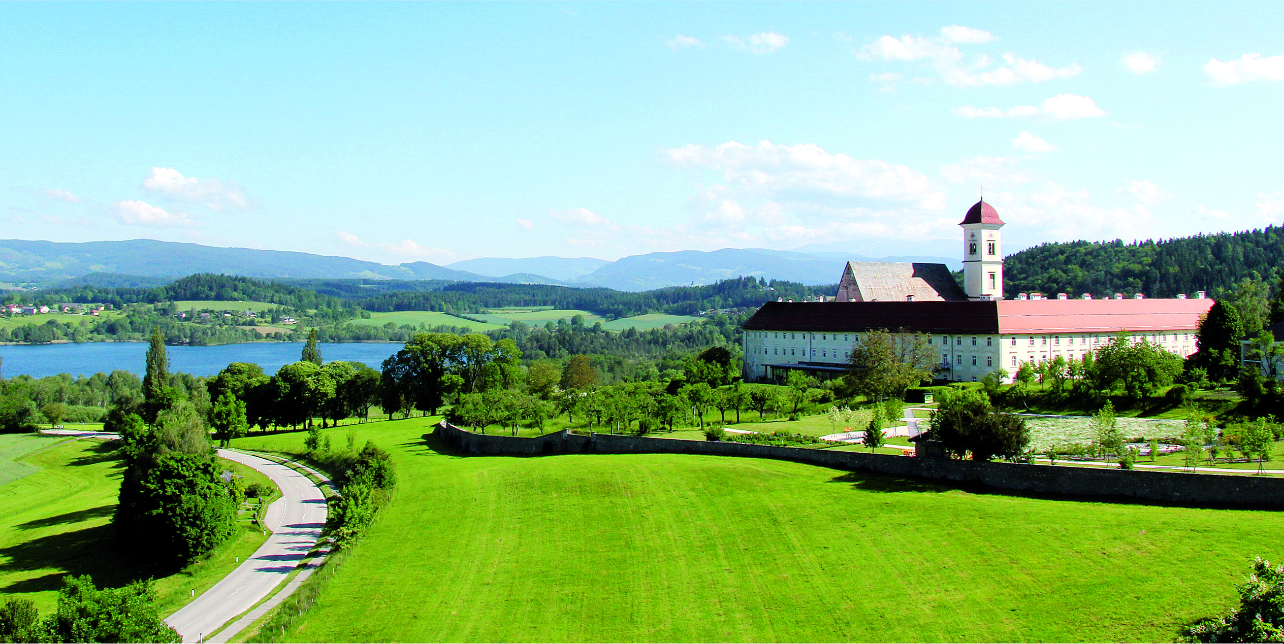 Das Stift St. Georgen am Längsee ist ein Referenzbetrieb, der Bildung und qualitätvollen Seminar-Tourismus in einer einzigartigen Weise verbindet.